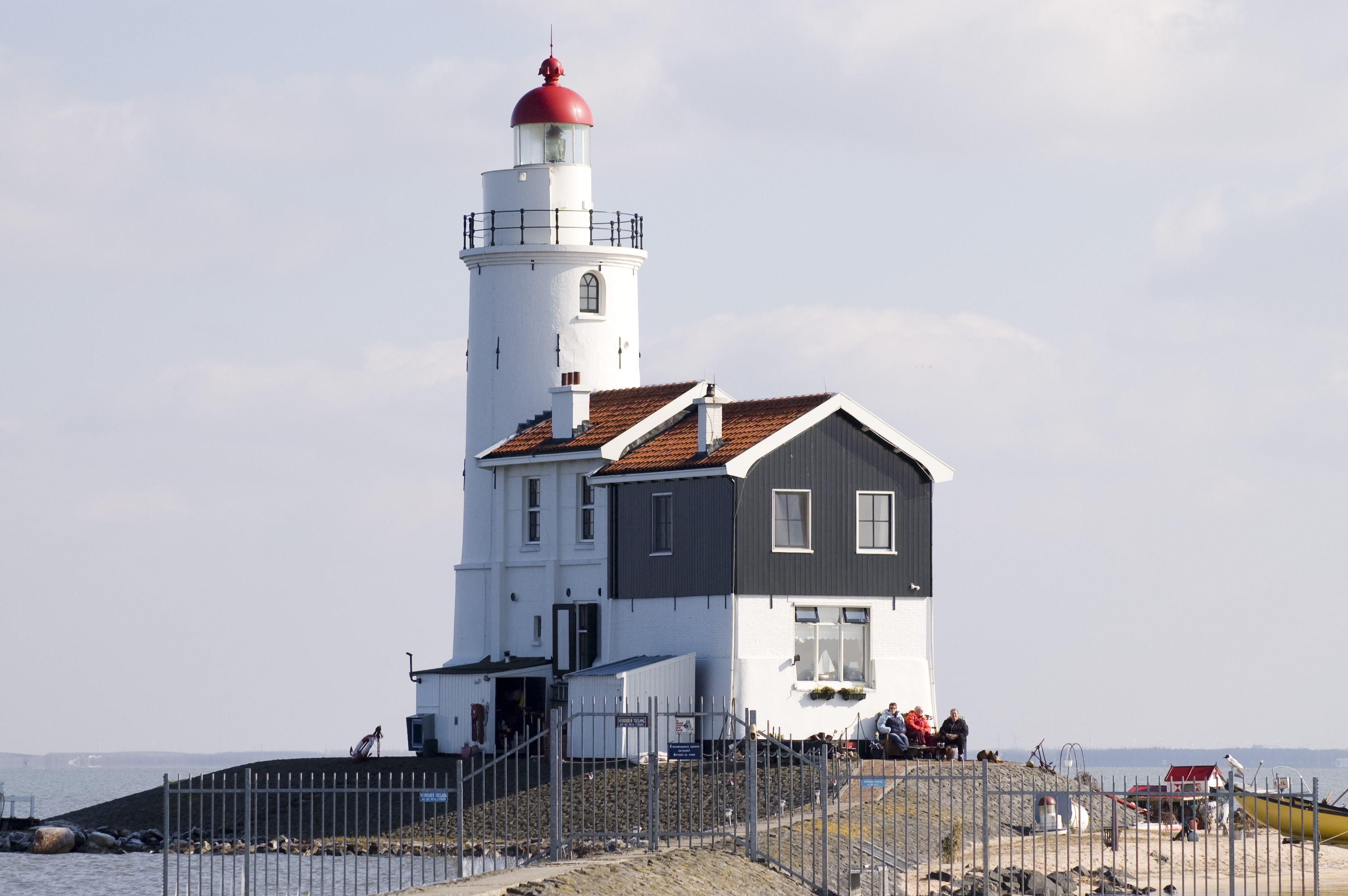 Marken, Vuurtoren